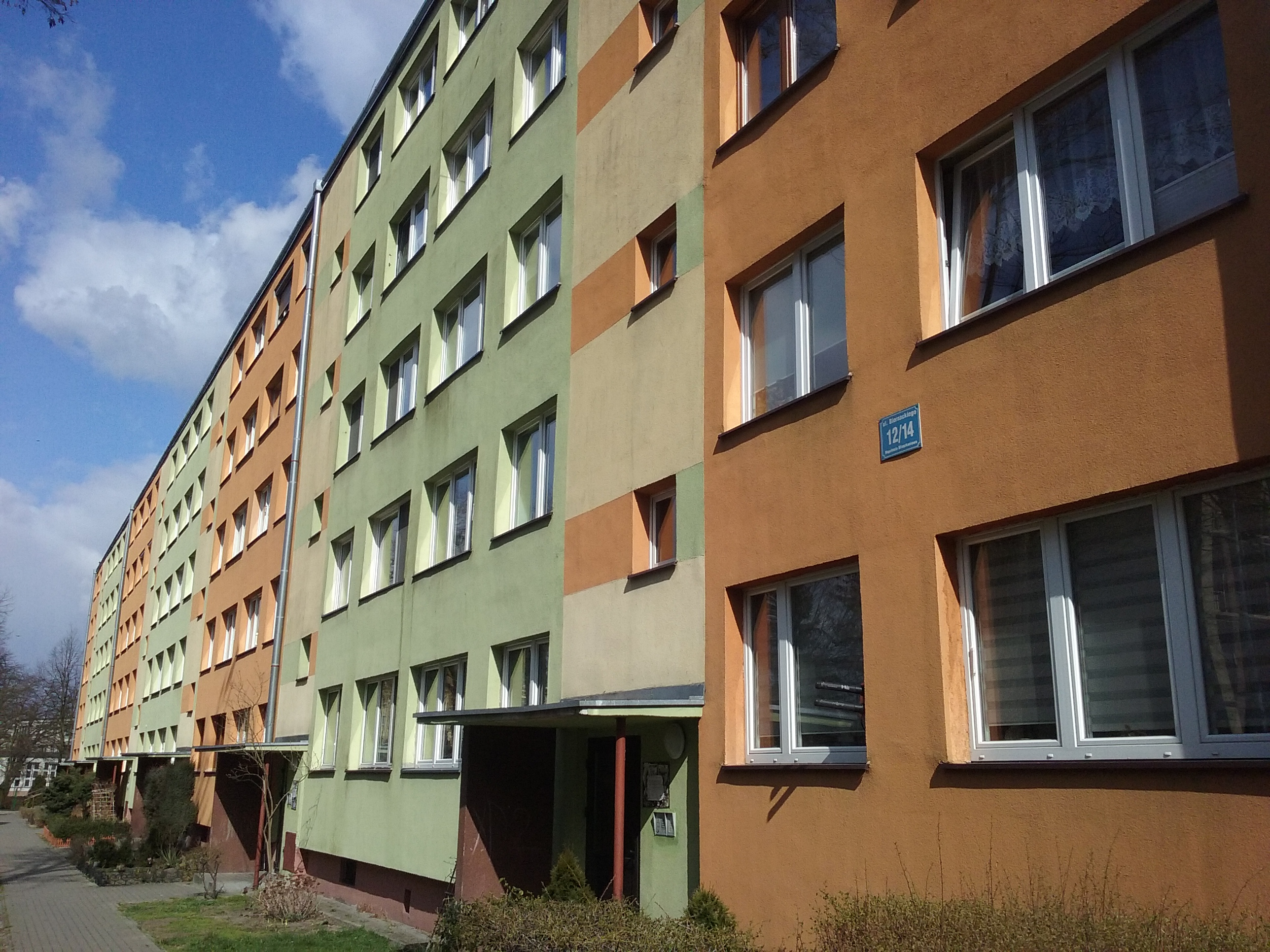 Biernackiego 12/14 w Tomaszowie Mazowieckim w województwie łódzkim